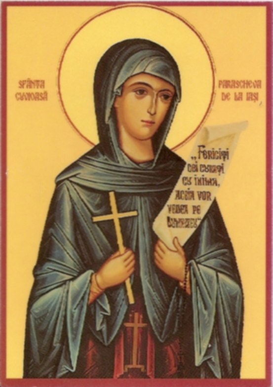 Ícono religioso de Santa Parascheva.